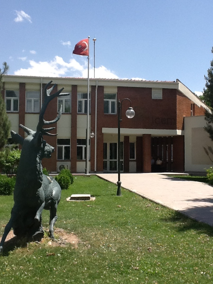 İşitme Engelli Çocuklar Eğitim, Araştırma ve Uygulama Merkezi (İÇEM)